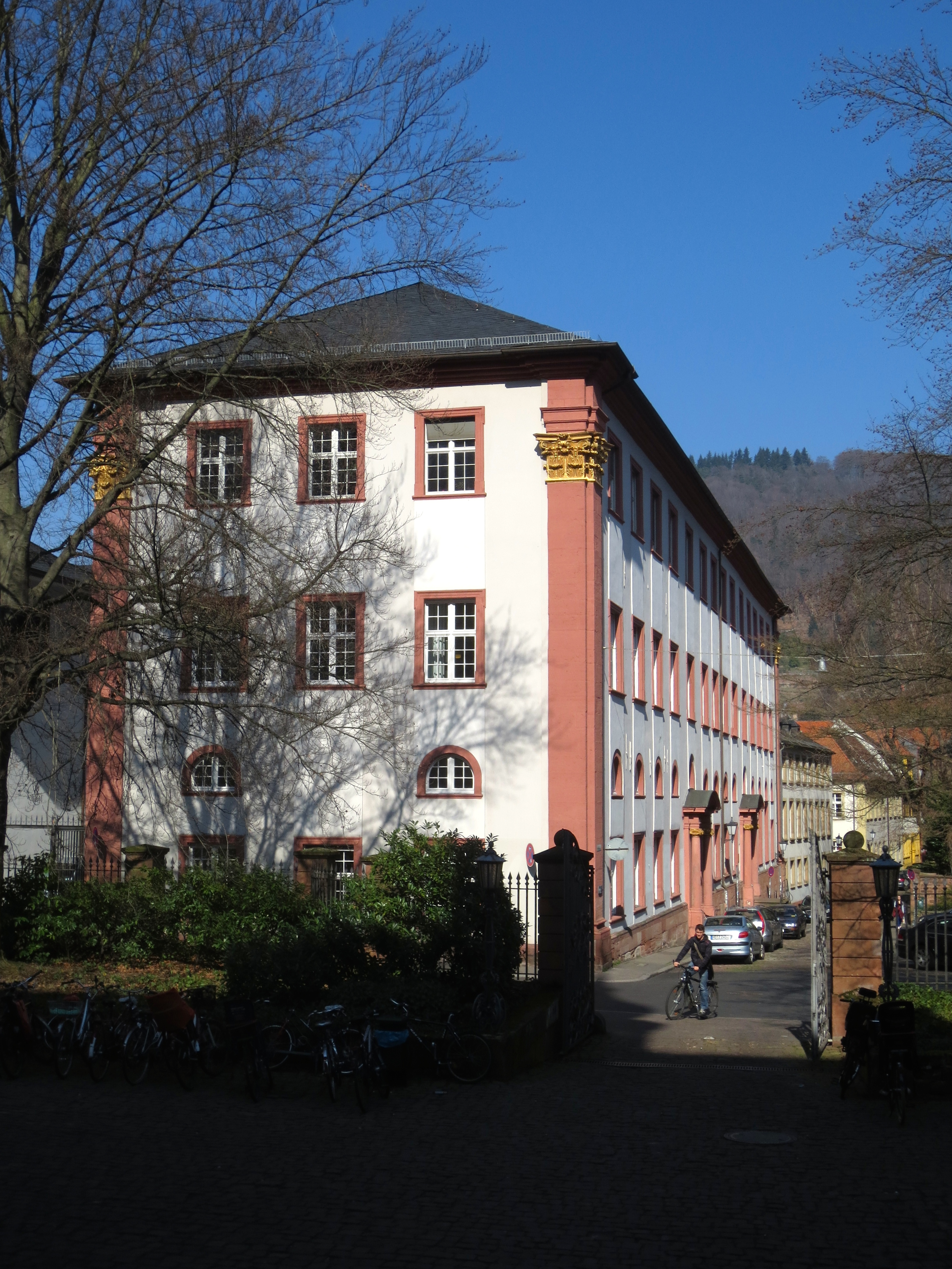 V. Heidelberg Gebäude des Barock erbaut nach den Plänen von Adam Breunig ursprünglich als Jesuitenstift, beherbergt heute das Philosophische Seminar und Slavische Institut, Blick vom Portal des Carolinum auf das Gebäude in der Schulgasse und auf den Heiligenberg, Altstadt Campus der Universität